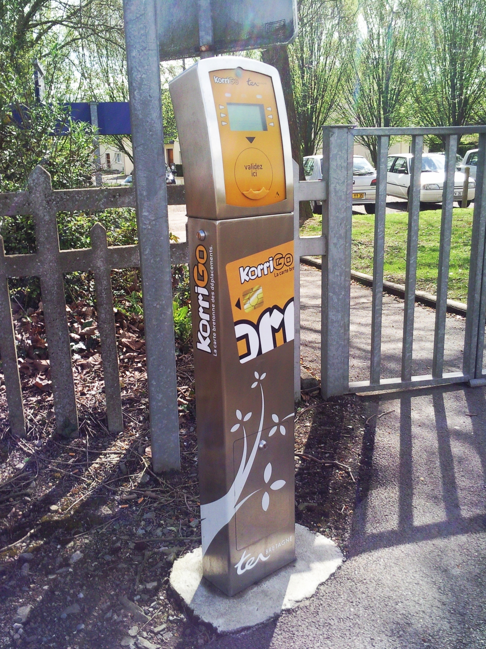 Dispositif de billettique électronique Korrigo.